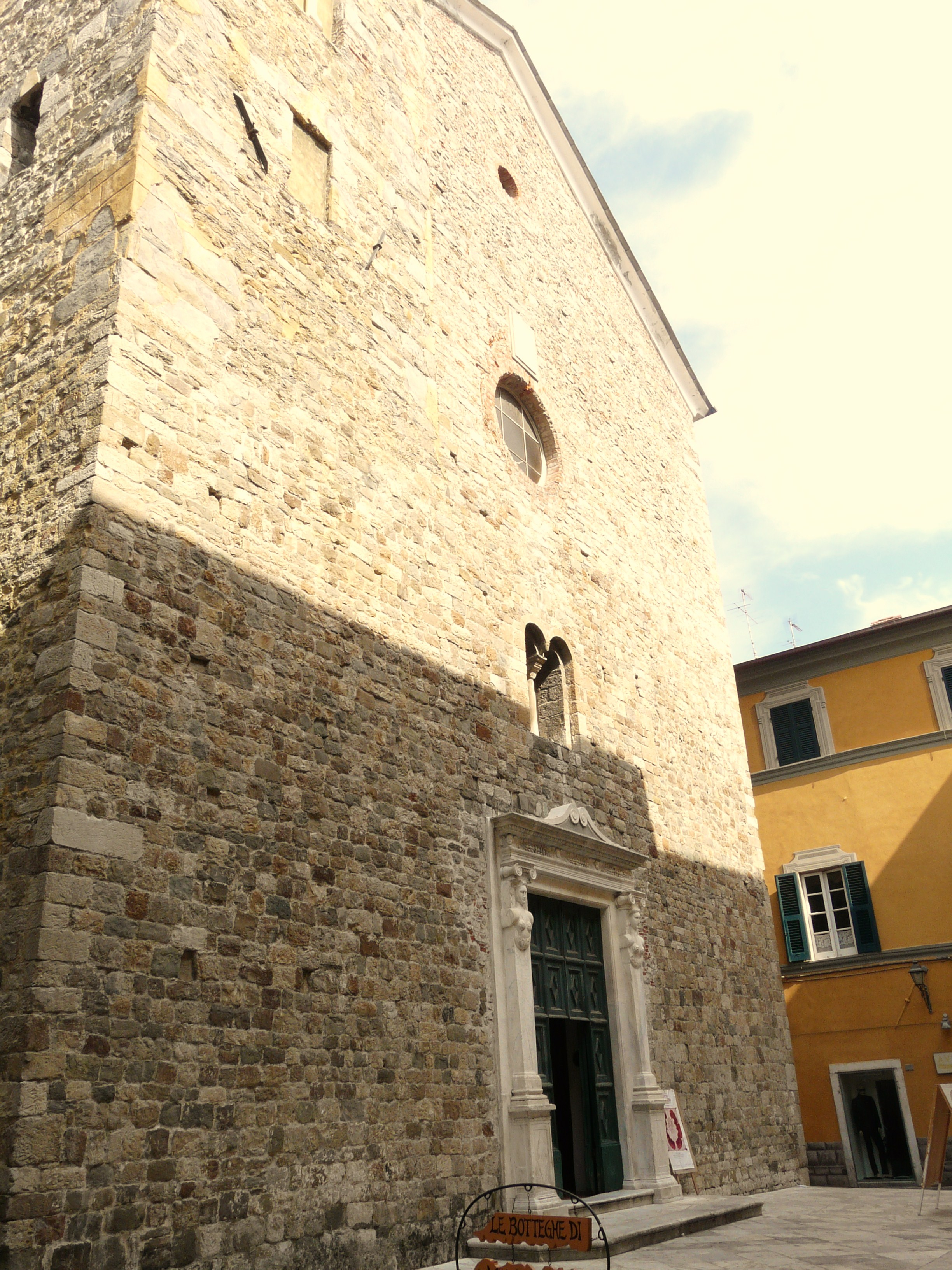 Pieve di Sant'Andrea, Sarzana, Liguria, Italia